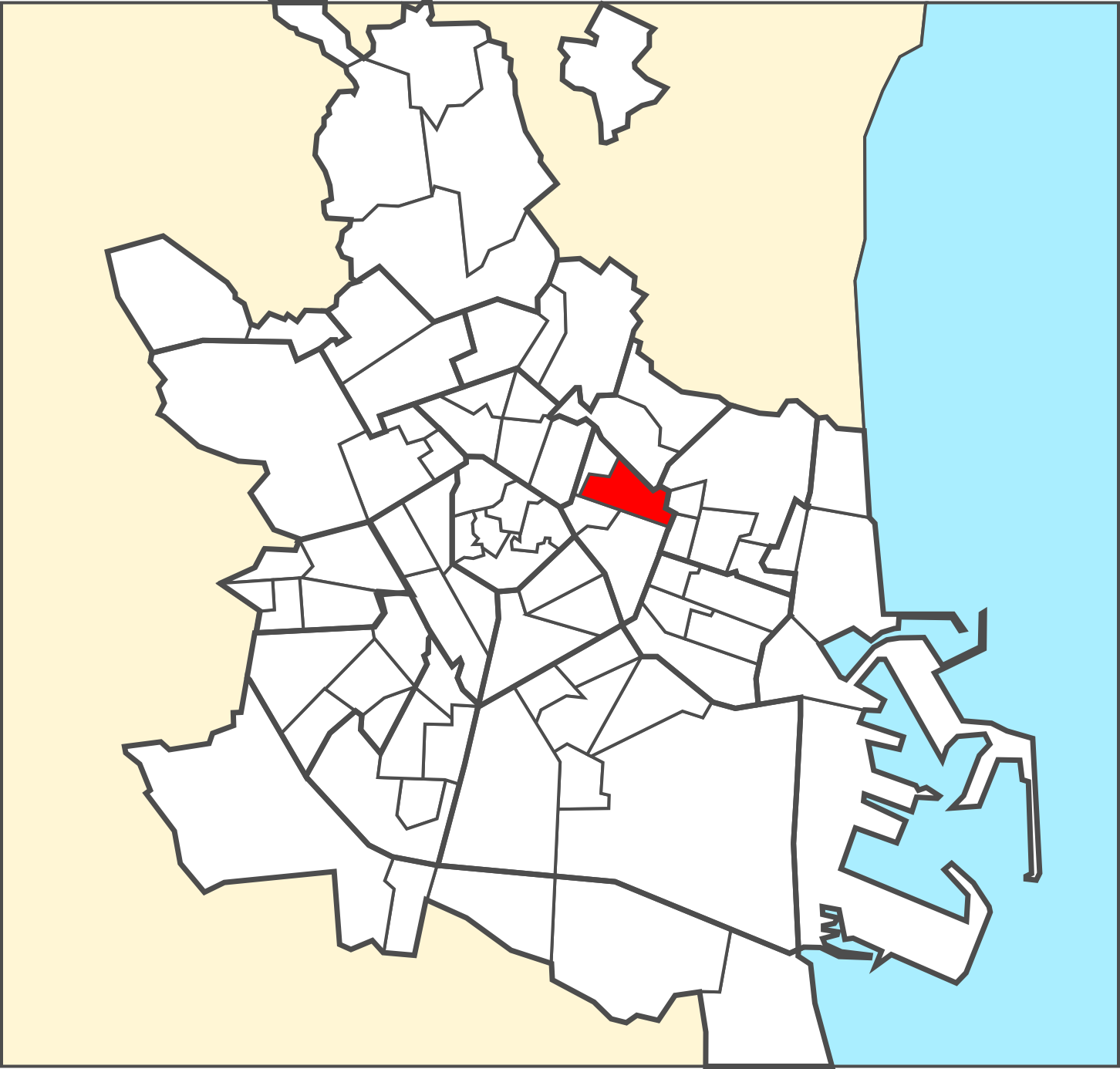 Localització del barri dins de la ciutat de València.